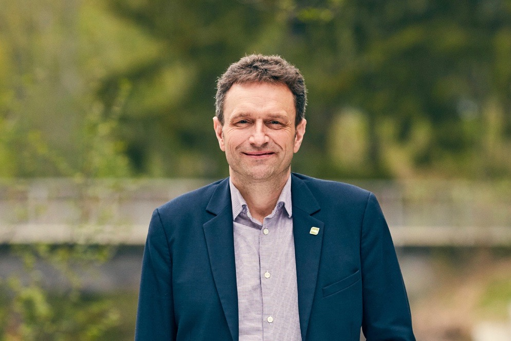 Arild Hermstad. MDG Landsmøte Lillehammer Hotel Mai 2017.